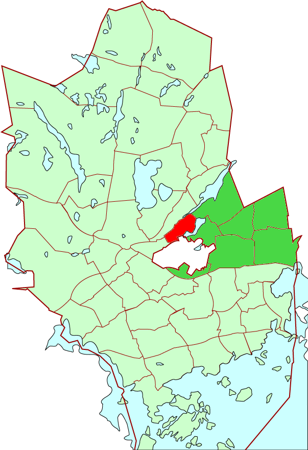 Lippajärvi/Klappträsk district in Espoo city, Finland